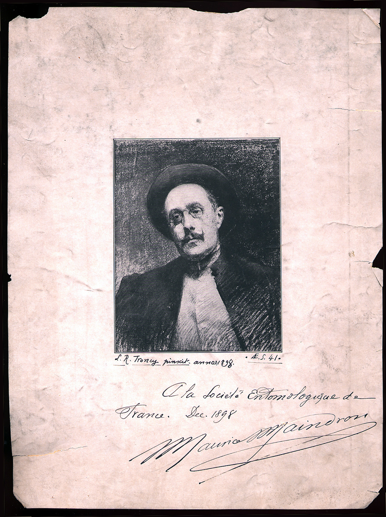 Portrait de Maurice Maindron à 41 ans.